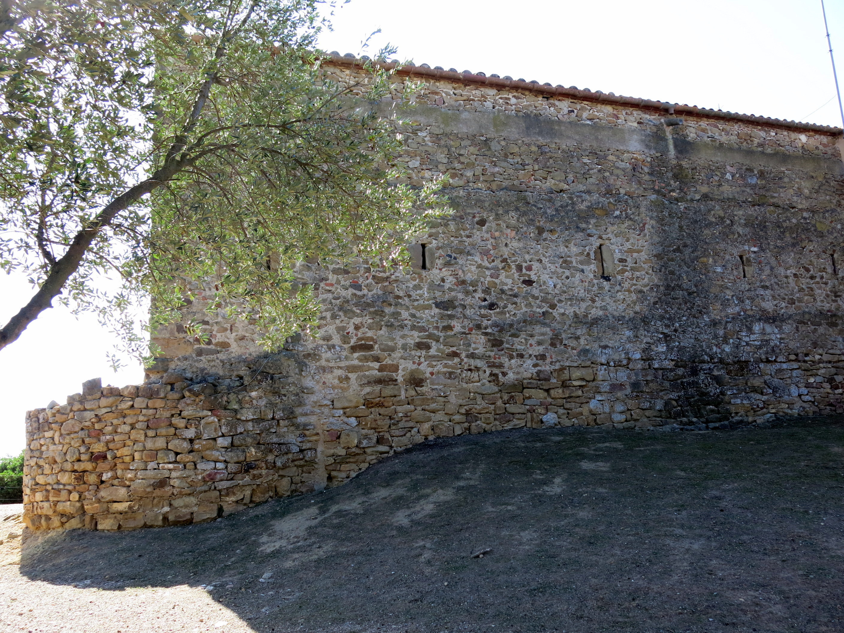 castell de Sant Andreu al poblat d' Ullastret - Baix Empordà - Catalunya